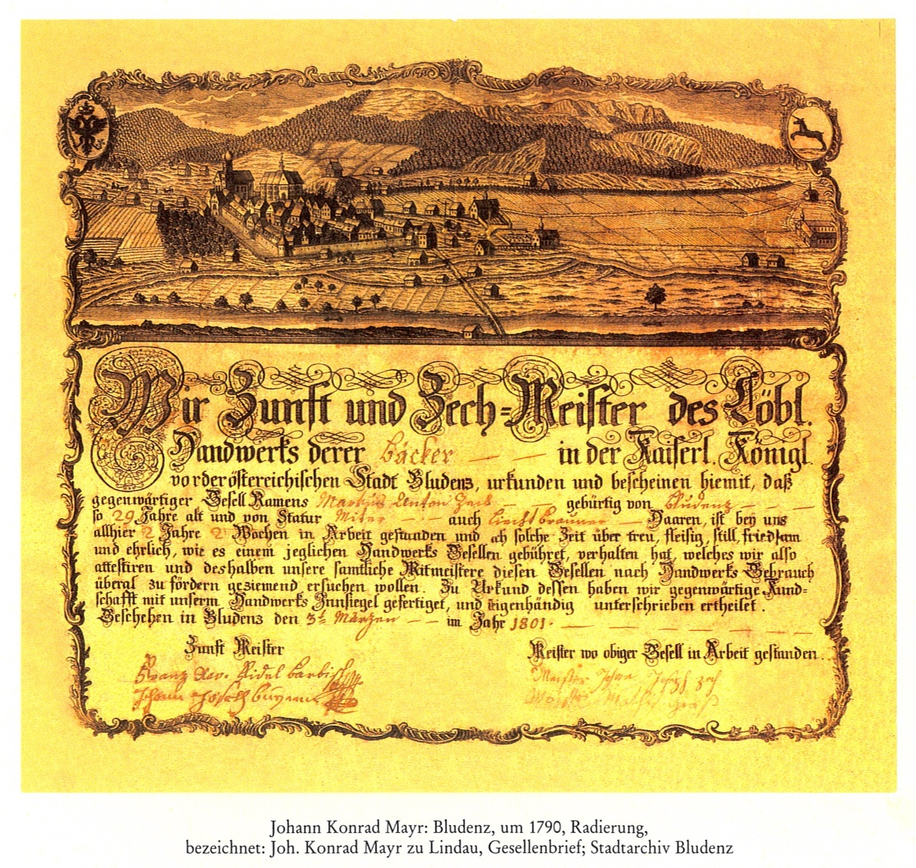 Im Jahre 1801 wurde der Gesellenbrief von der Bludenzer Zunft für den Bäckergesellen Martin Anton Zeck ausgestellt. Das Bild zeigt die Stadt Bludenz um 1790. Radierung von Johann Konrad Mayr aus Nürnberg